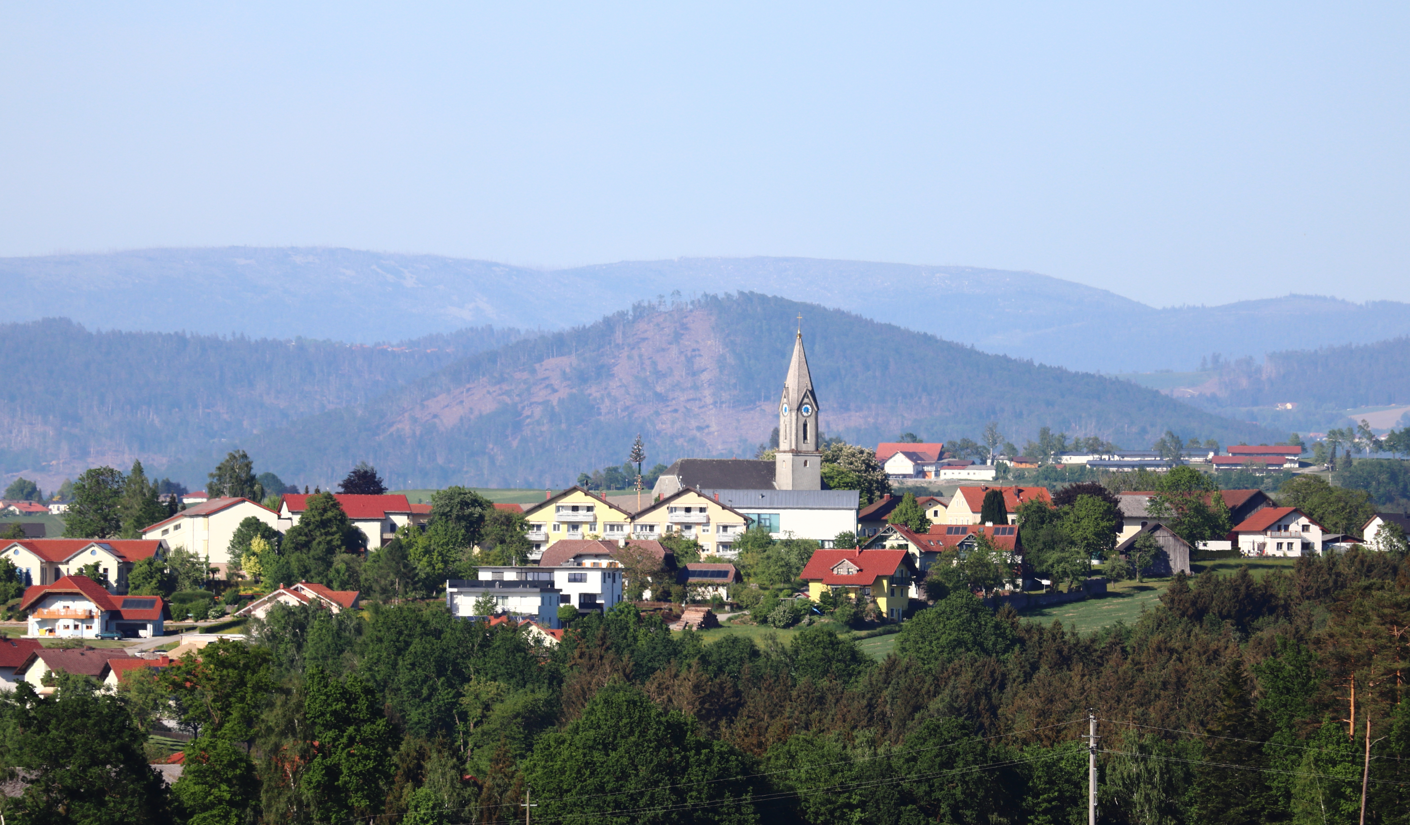 Ortsansicht der Gemeinde Freinberg (Oberösterreich); Blickrichtung Nordosten